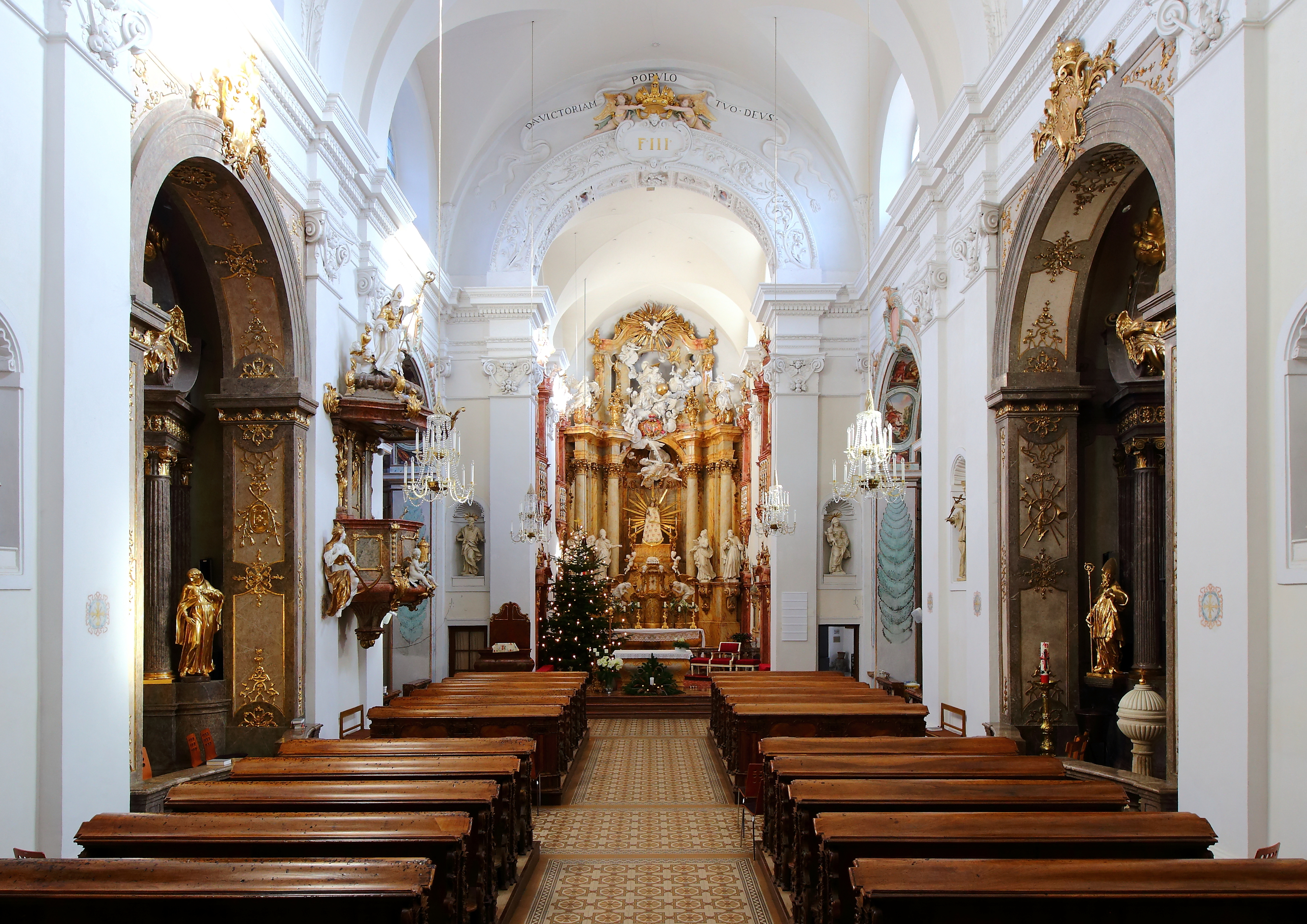 Innenansicht der Pfarr- und Wallfahrtskirche Mariabrunn in Hadersdorf, ein Teil des 14. Wiener Gemeindebezirk Penzing.Der Hochaltar ist ein Werk des Fraters Cajetanus aus dem Jahr 1768. Im Zentrum dessen befindet sich eine gotische Marienstatue, die aus der ersten Hälfte des 16. Jahrhunderts stammt und die nach Errichtung der Kirche (1639-1655) aus einer Kapelle hierher übertragen wurde.